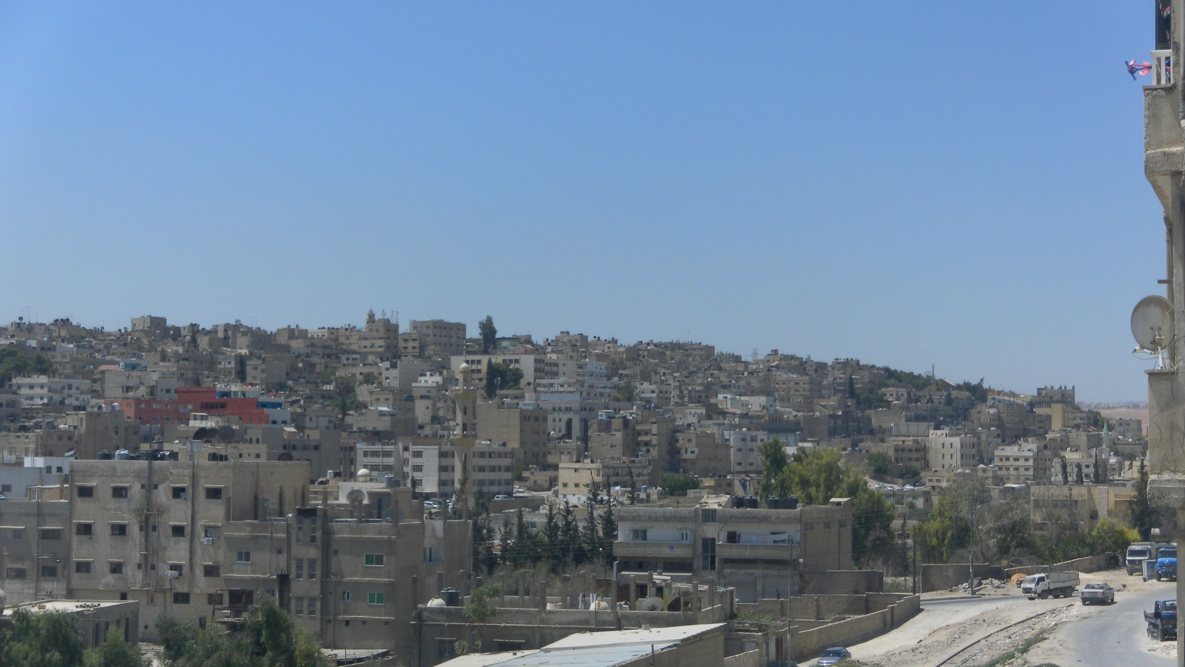 منظر من الجبل الجنوبي في الرصيفة, الزرقاء، الأردن